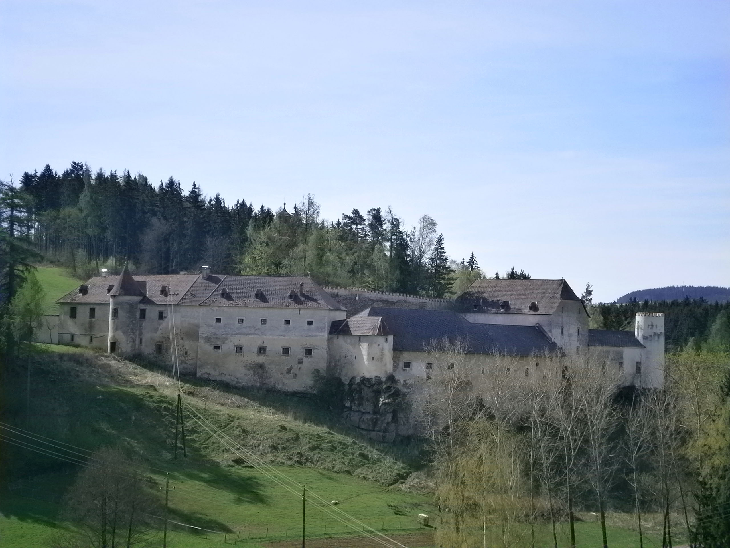 Object location48° 32′ 21.66″ N, 14° 23′ 20.28″ E